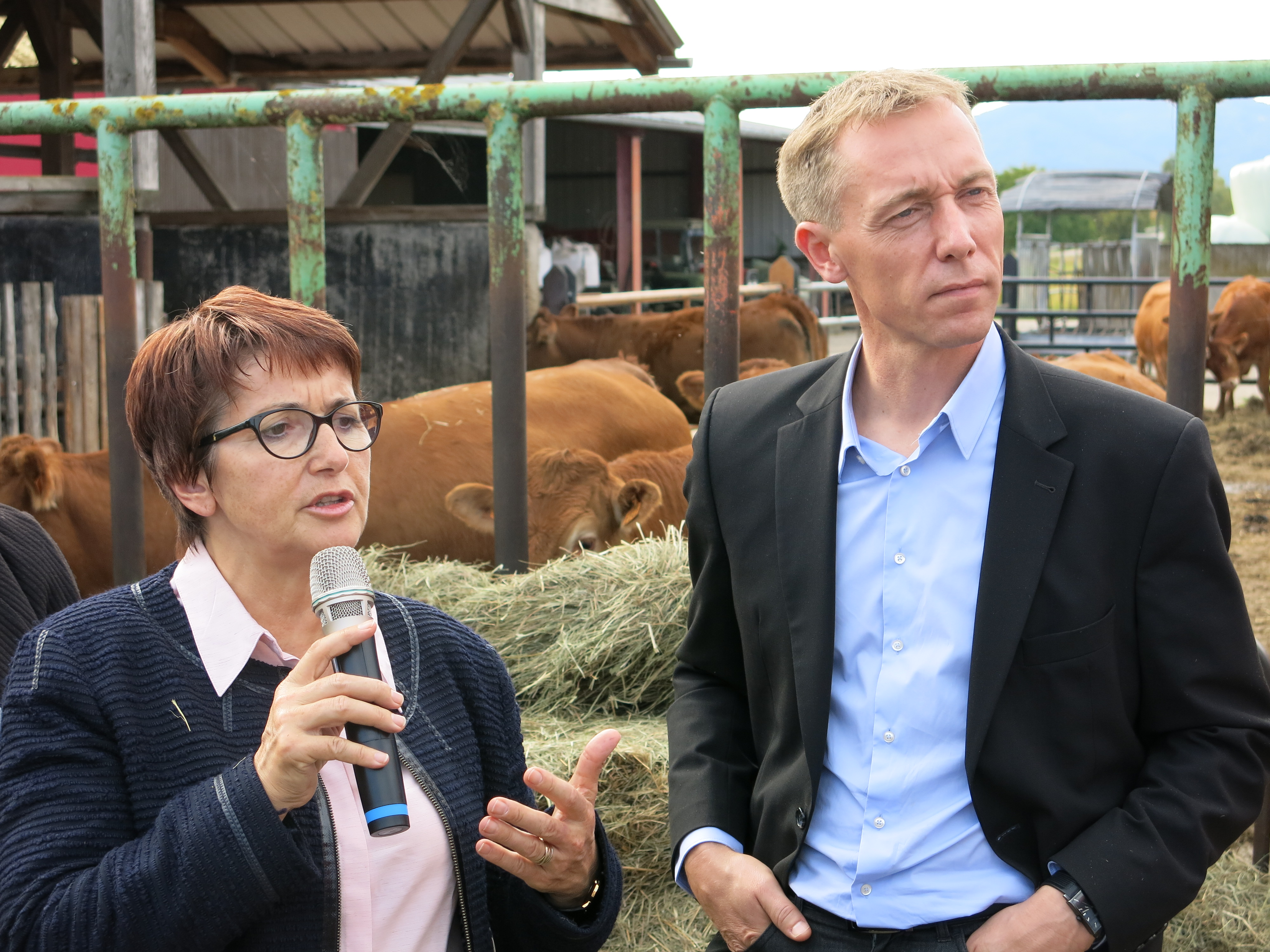 Franck Sander et Christiane Lamber en interview sur la Ferme Trau à Ebersheim